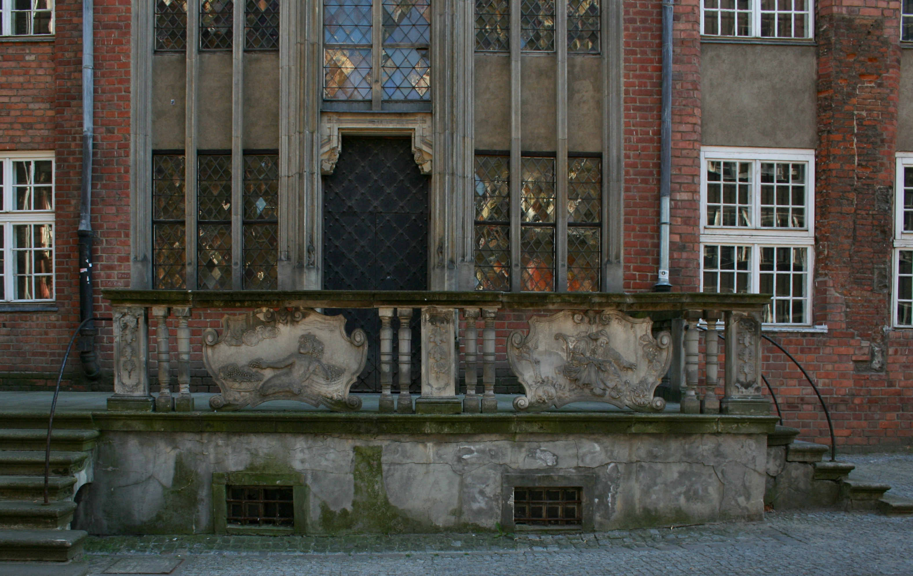 Wejście do Domu Schlieffów przy ulicy Chlebnickiej na Głównym Mieście w Gdańsku